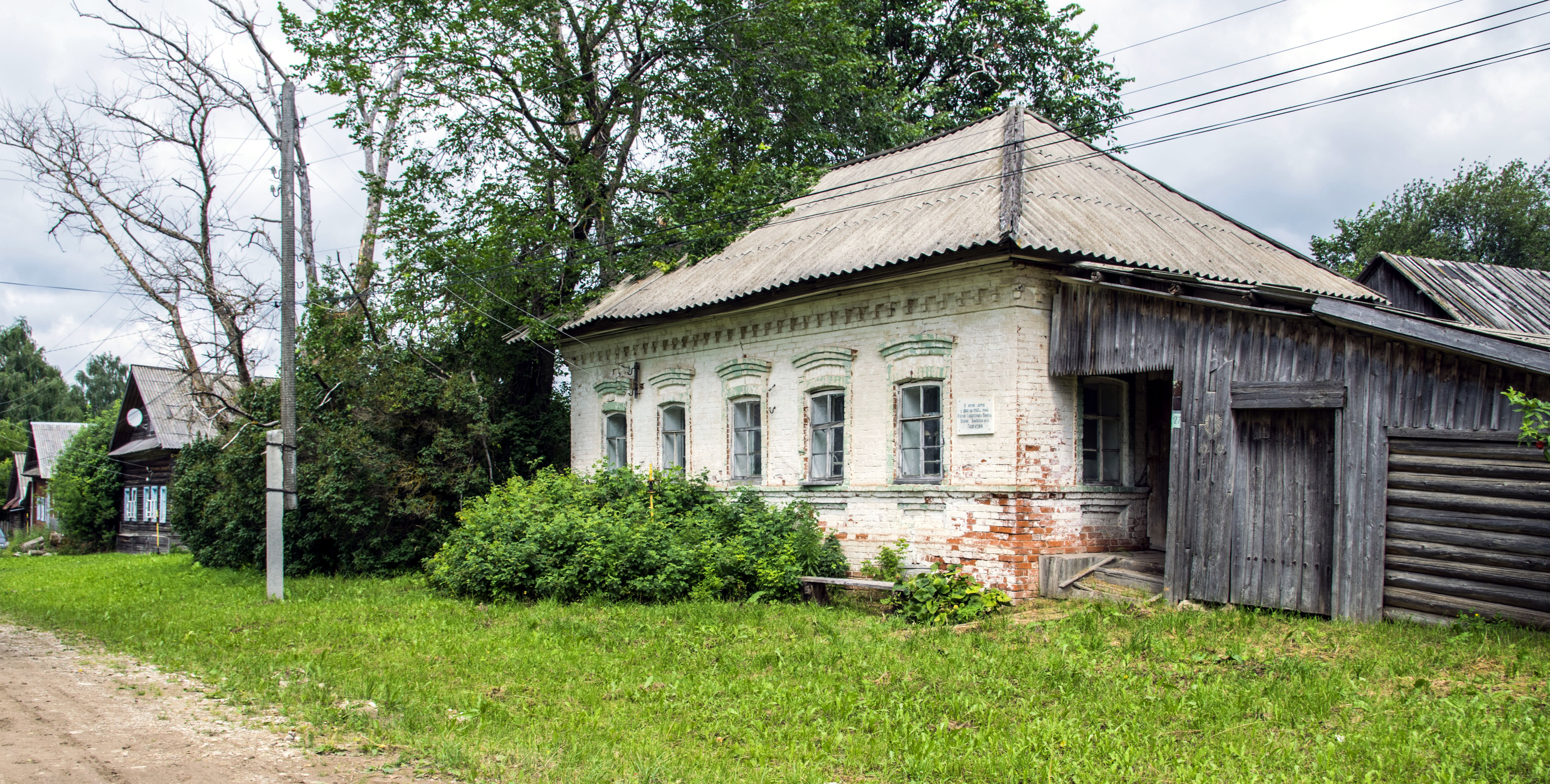 Дом, в котором родился и жил Герой Советского Союза Б.В. Лопатин: Верхосунье, Сунский район, Кировская область